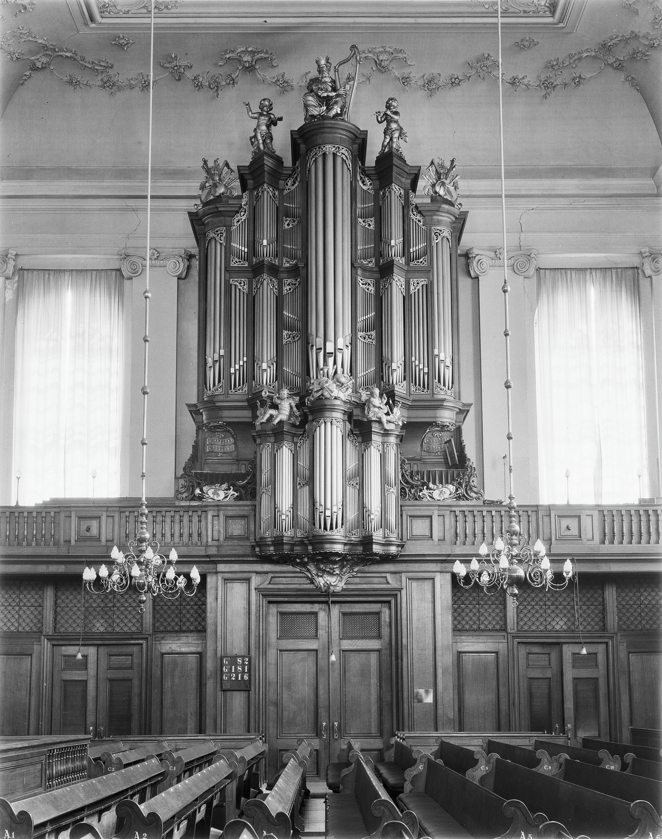 Lutherse Kerk: orgel